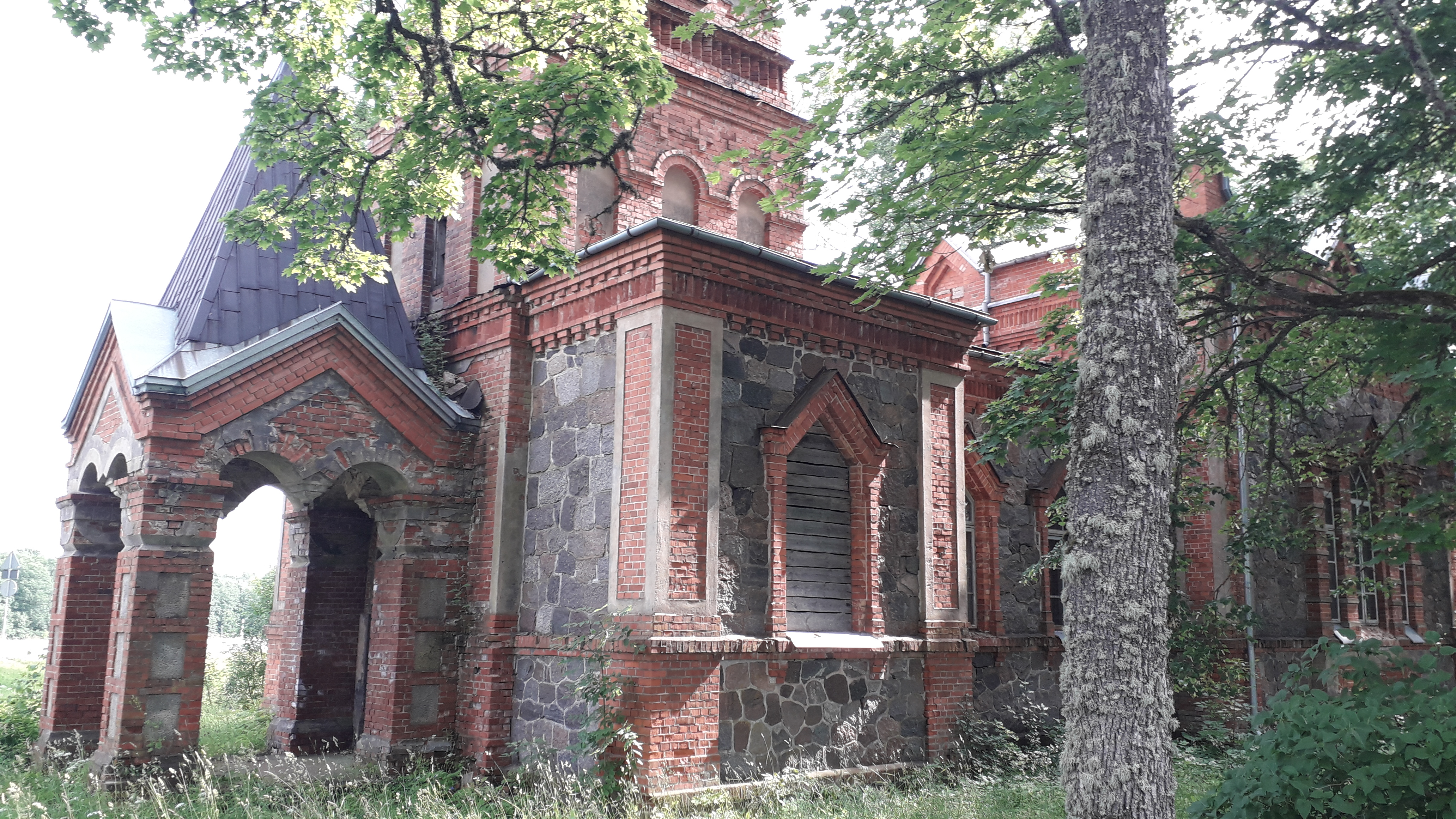 Ehemalige orthodoxe Kirche